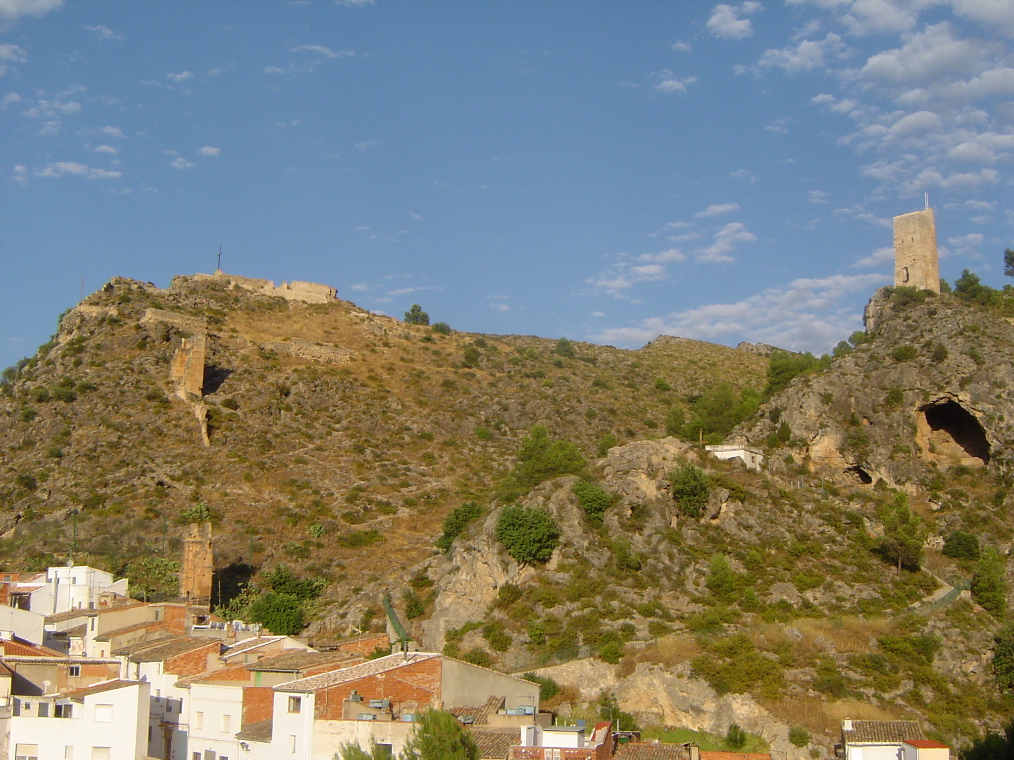 Vista del Castillo de Moixent